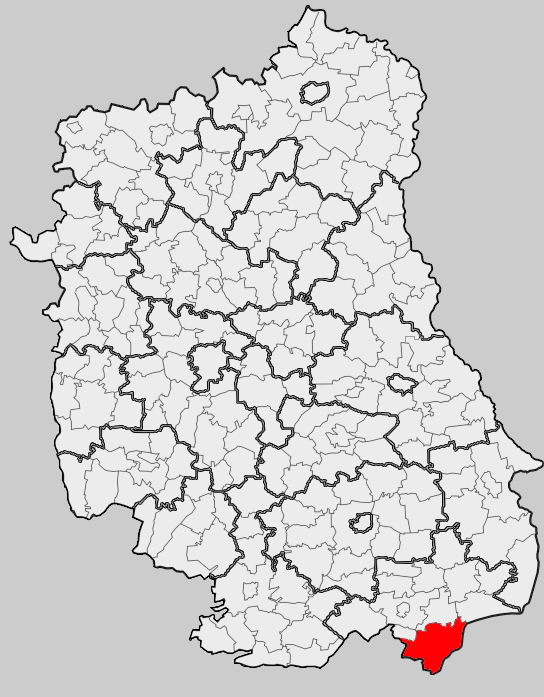 Map of gmina Lubycza Królewska, Tomaszów Lubelski county, Lublin voivodship Mapa gminy Lubycza Królewska, powiat tomaszowski, województwo lubelskie